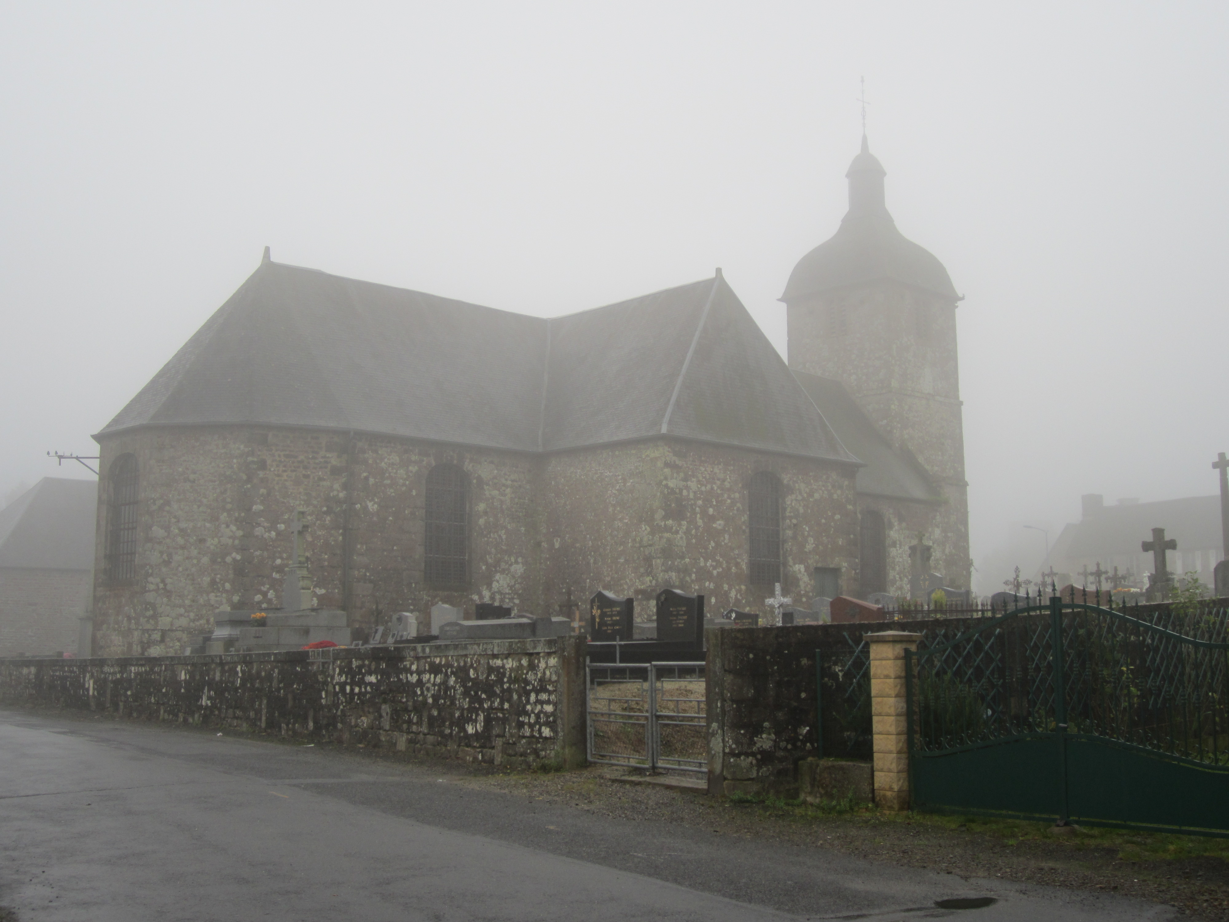 Vengeons, Manche